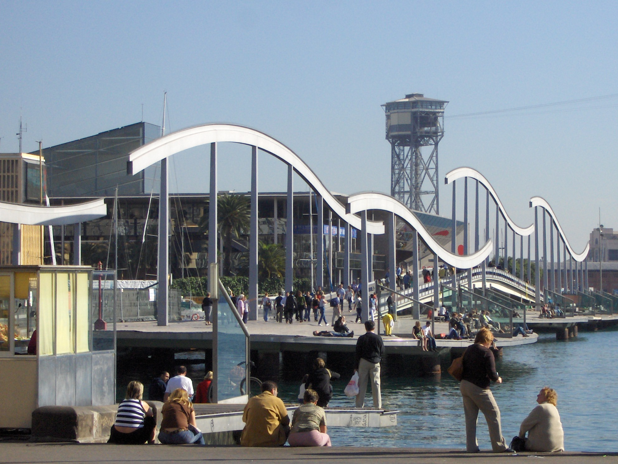 Maremagnum, Barcelona, Catalunya.